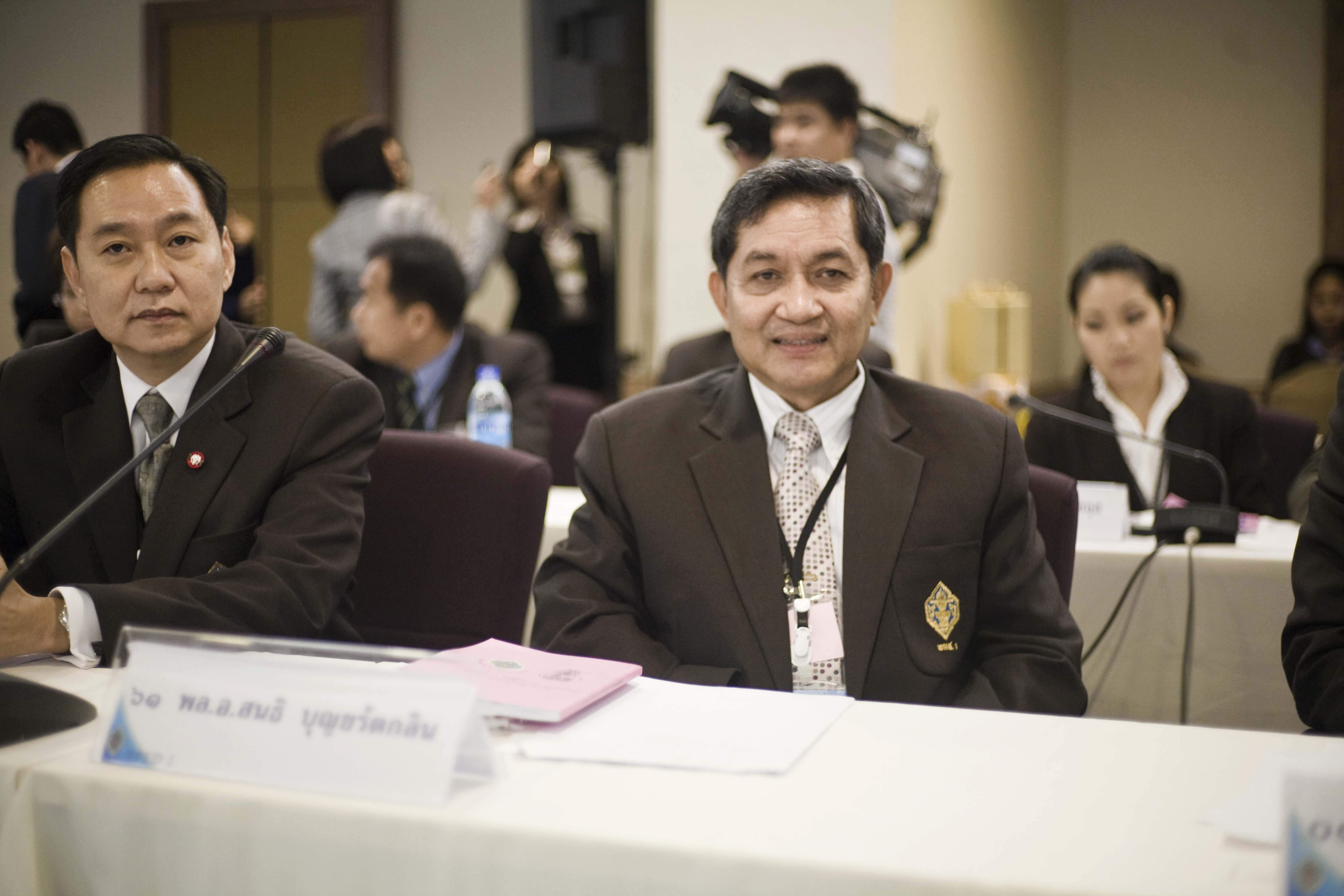 สนธิ บุญยรัตกลิน หลักสูตร การพัฒนาการเมืองและการเลือกตั้งระดับสูง รุ่นที่ 1 ประจำปี 2552 ณ สถาบันพัฒนาการเมืองและการเลือกตั้ง ห้อง 704 สำนักงานคณะกรรมการการเลือกตั้ง ชั้น 7 ศูนย์ราชการเฉลิมพระเกียรติฯ อาคารบี ถนนแจ้งวัฒนะ กรุงเทพฯ 31สิงหาคม2552 (The Official Site of The Prime Minister of Thailand Photo by พีรพัฒน์ วิมลรังครัตน์)